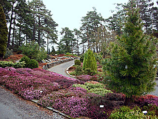 Arboretets venner kom med en lynghage som gave 21. august 1996 da Det norske arboret fylte 25 år. Hagen blei plassert nær veksthuset.